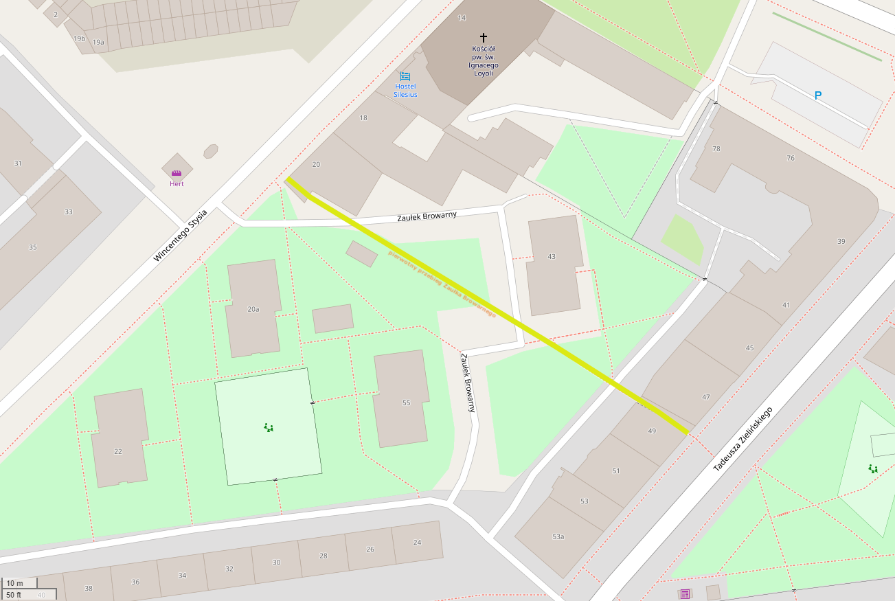 Zaułek Browarny na mapie Wrocławia - droga dojazdowa wg OpenStreetMap, dodano rzeczywisty historyczny przebieg ulicy